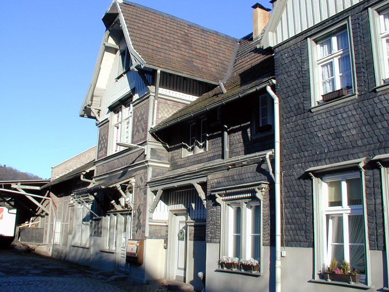 Ortschaft Dahlhausen, Radevormwald, Selbst 2001 fotografiert, GFDL